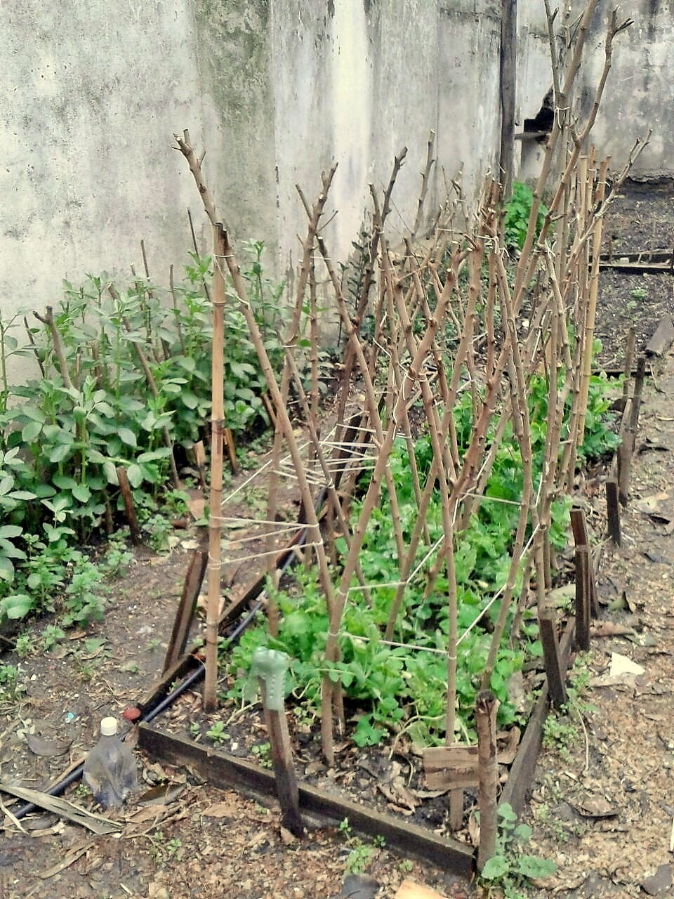 En plena ciudad una huerta orgánica con todo lo que esta implica, los productos que se obtienen de ella son para una alimentación saludable y conservación ambiental. Esta porción de tierra pertenece a un centro de formación laboral, donde yo estudio, esta destinada a la producción de hortalizas, mediante el manejo racional de recursos naturales, generando un espacio de educación y participación.